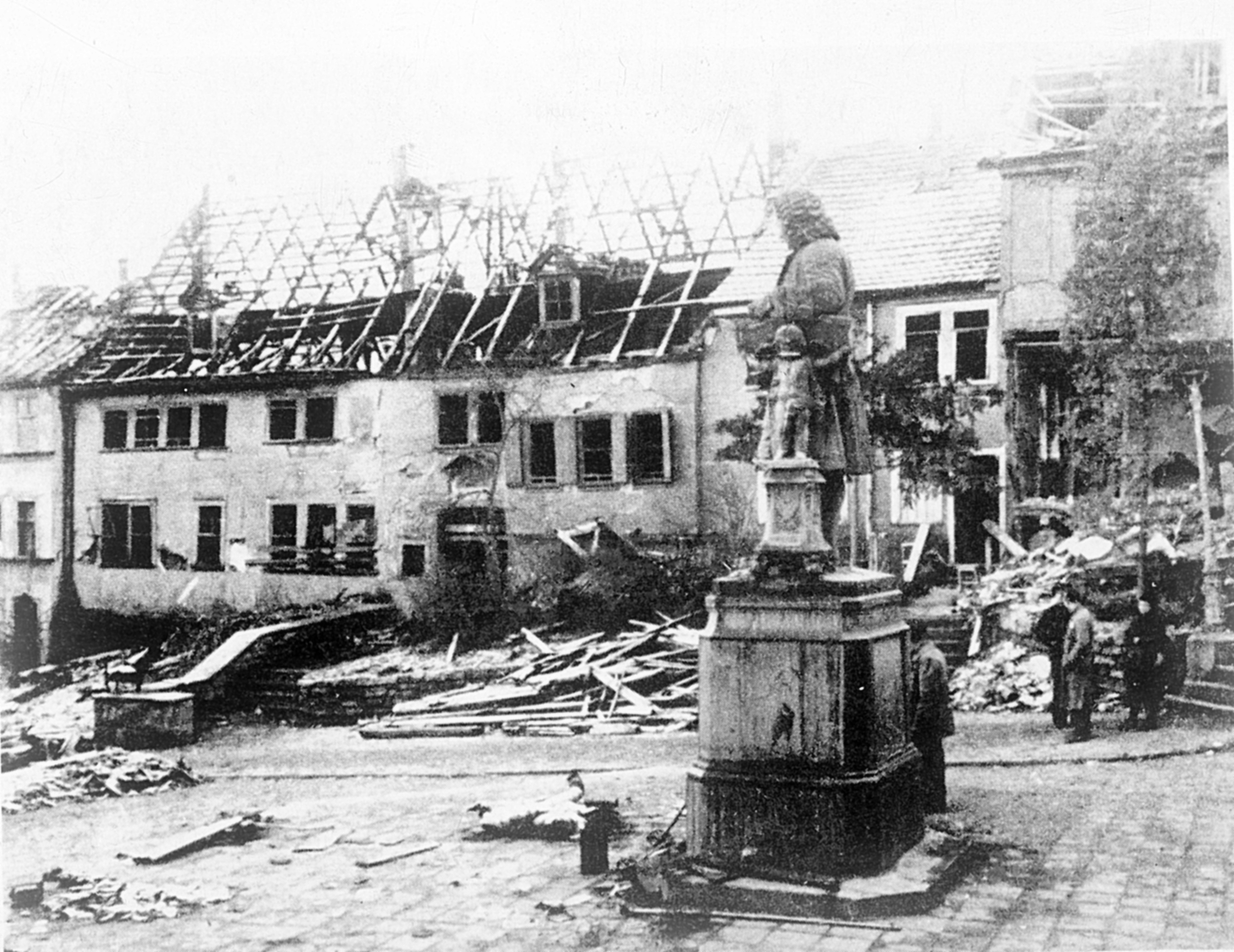 Das Bachhaus Eisenach nach dem Bombenangriff am 6. April 1945